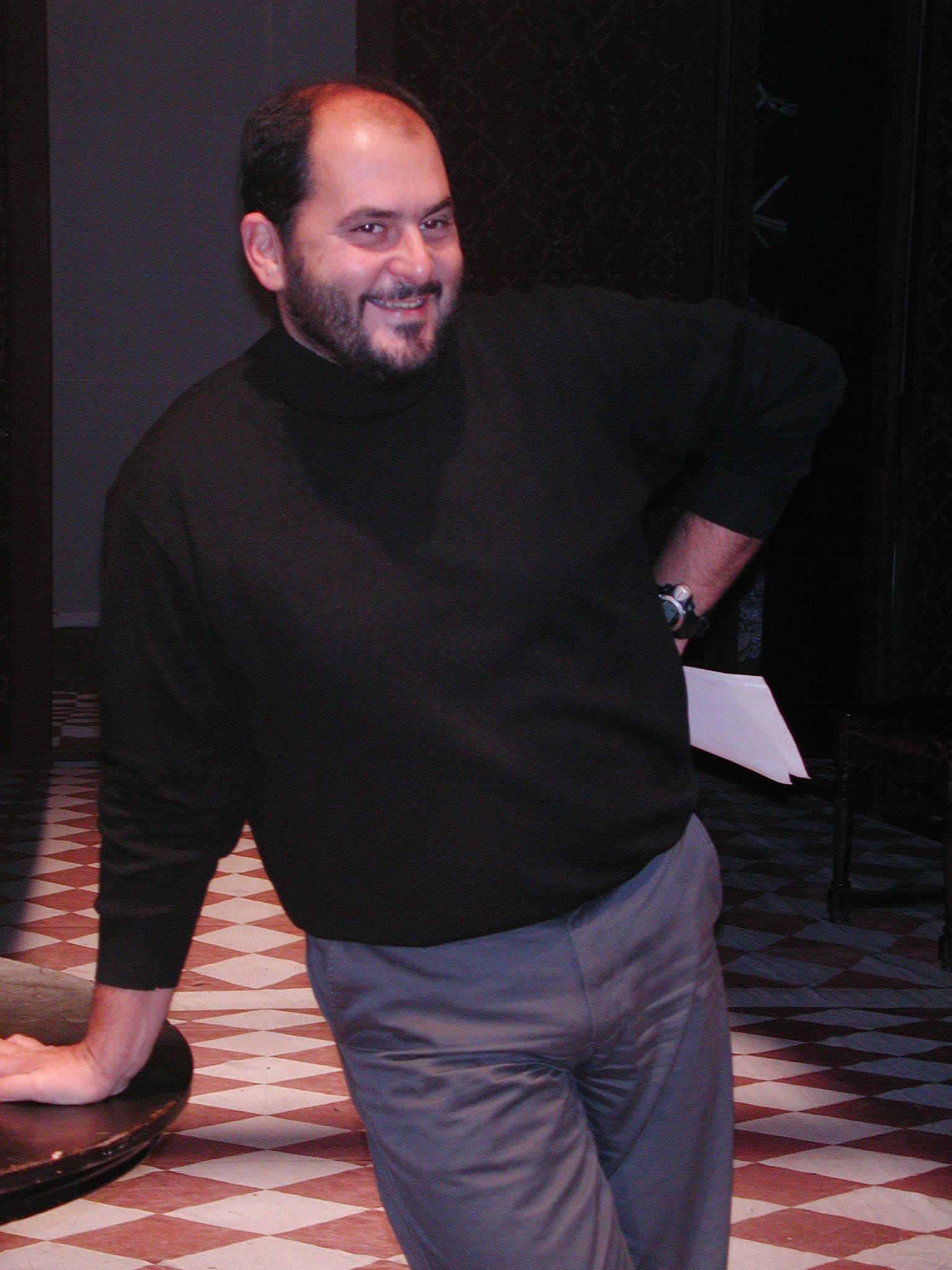 Paolo E. Landi